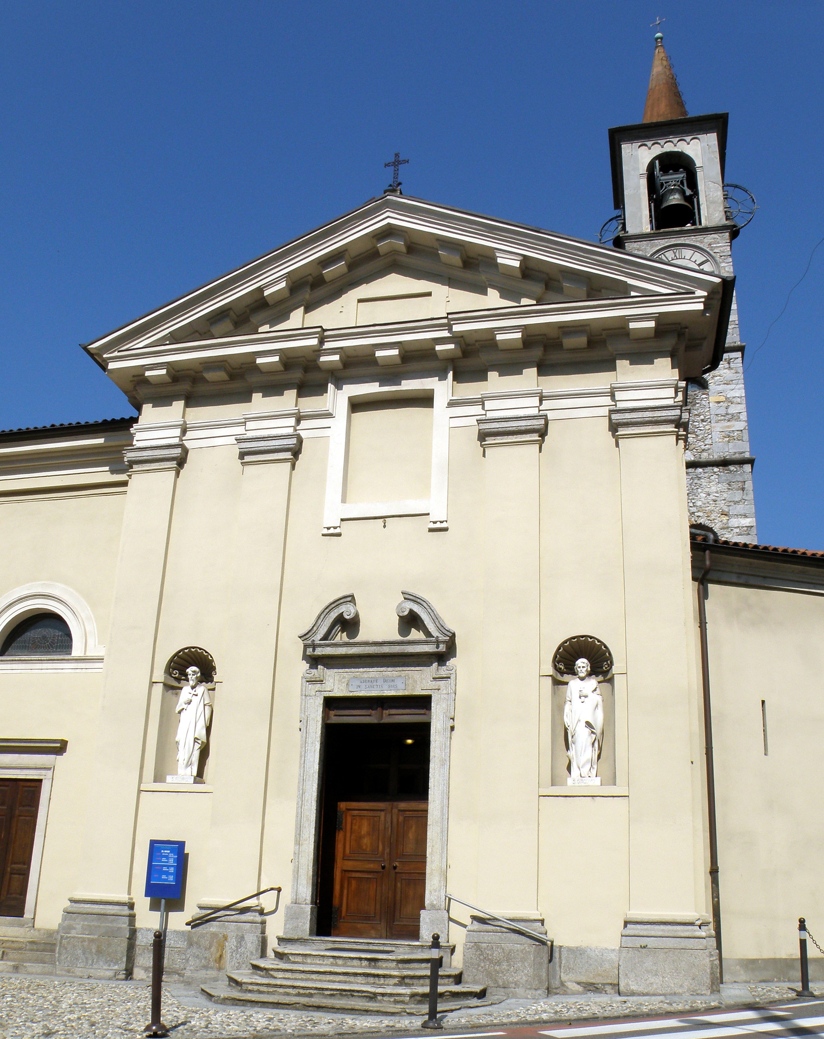 Laveno-Mombello (VA). Chiesa parrocchiale di San Filippo e Giacomo, detta Chiesa Vecchia.